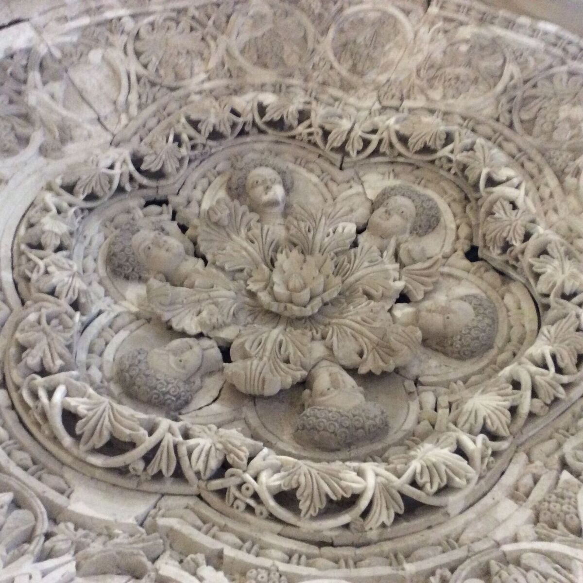 Décor du palais ommeyade d'Hishram à Khirbat al-Mafjar (proche de Jéricho), première partie du VIIIème siècle. Musée Rockefeller, Jérusalem